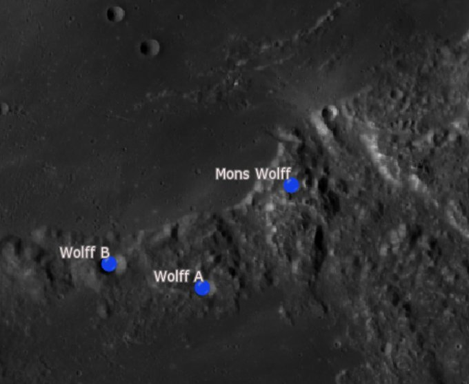 Mons Wolff. Cráteres satélite. (Imagen LRO)